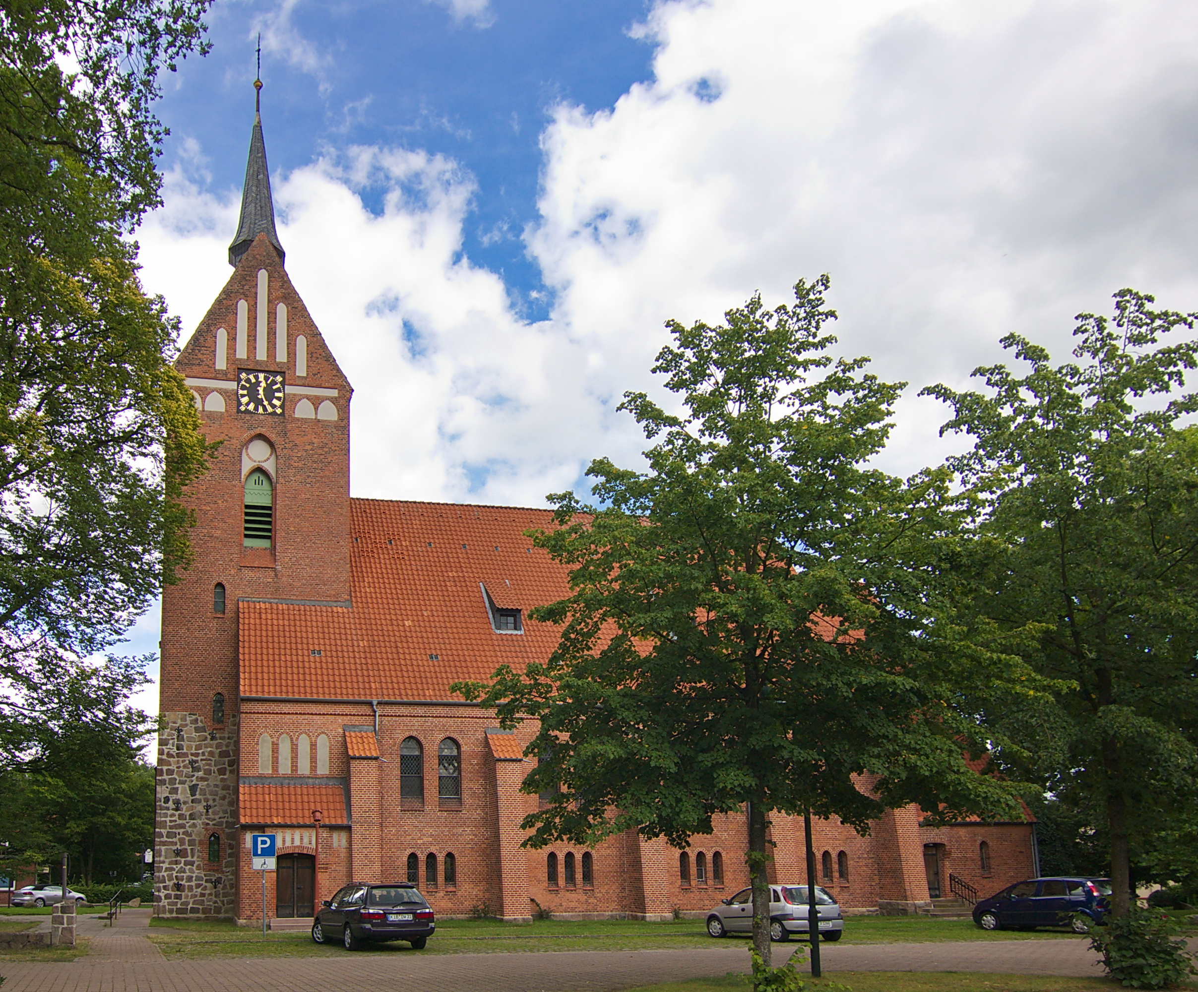 St.Antonius-Kirche von 1908 in Bispingen, Niedersachsen, Deutschland